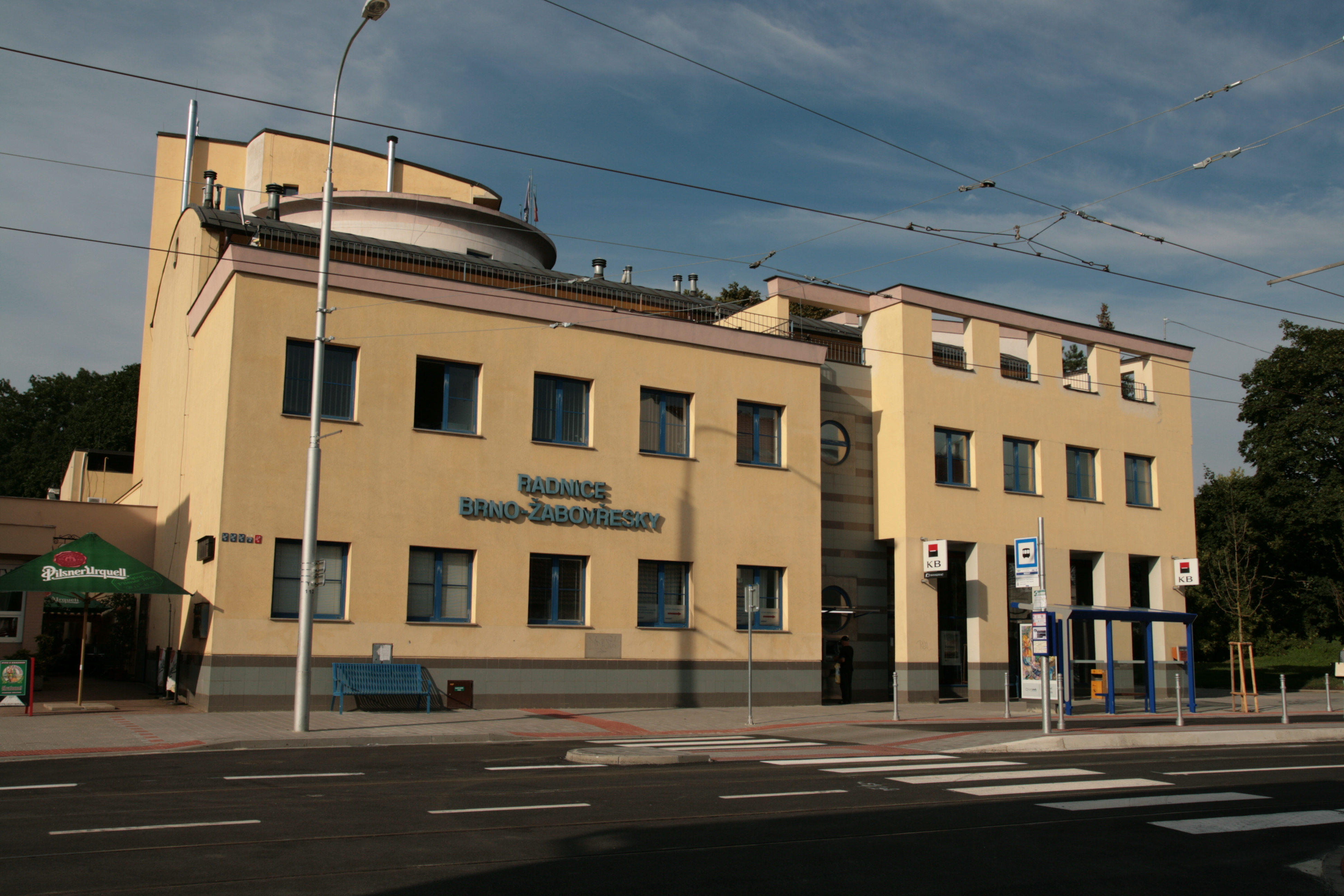 Žabovřeská radnice, Horova 1623/28, Brno-Žabovřesky.